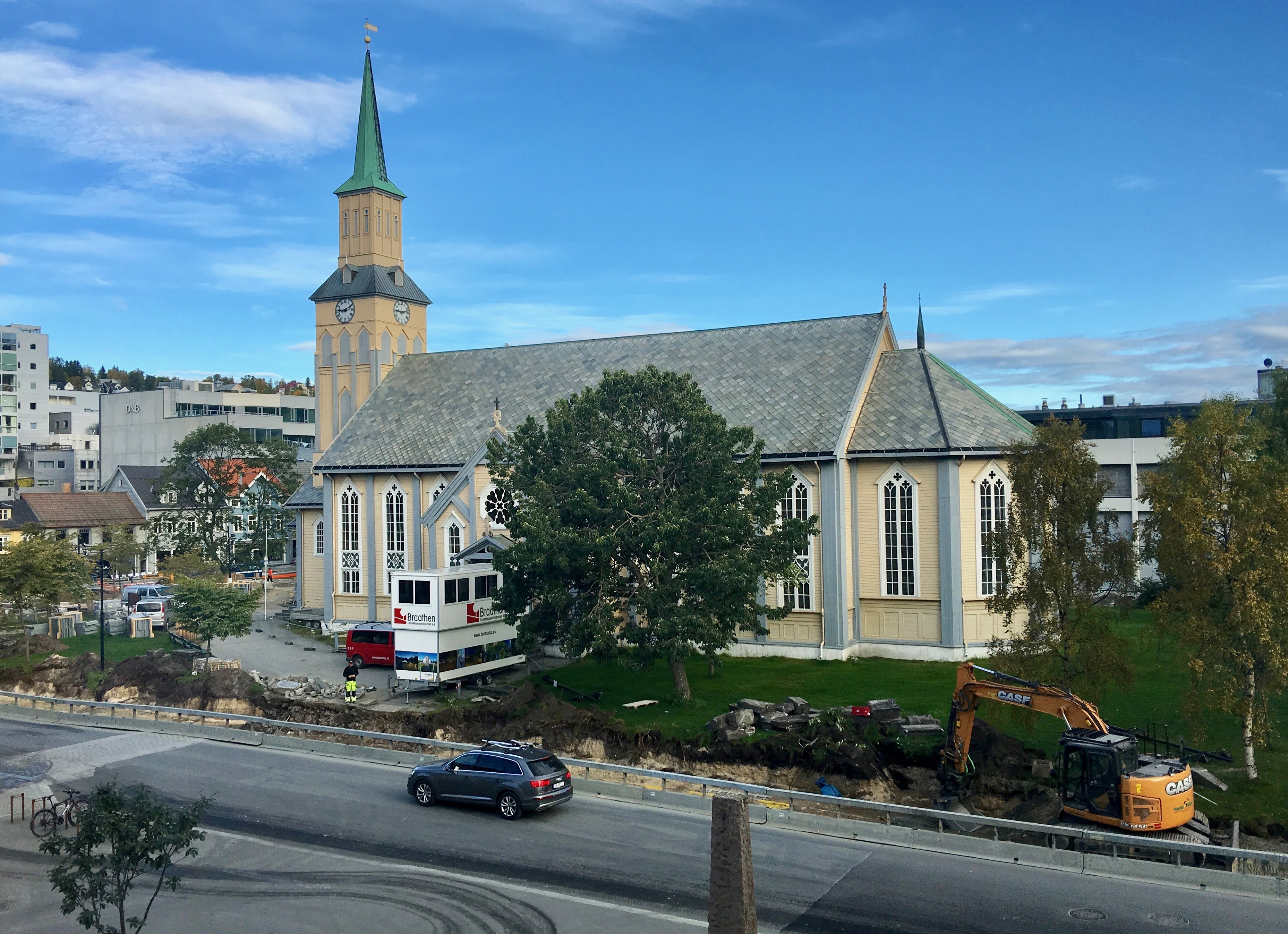 Arbeider langs Kirkegata/kirkeparken utenfor Tromsø domkirke. 14. september 2017.